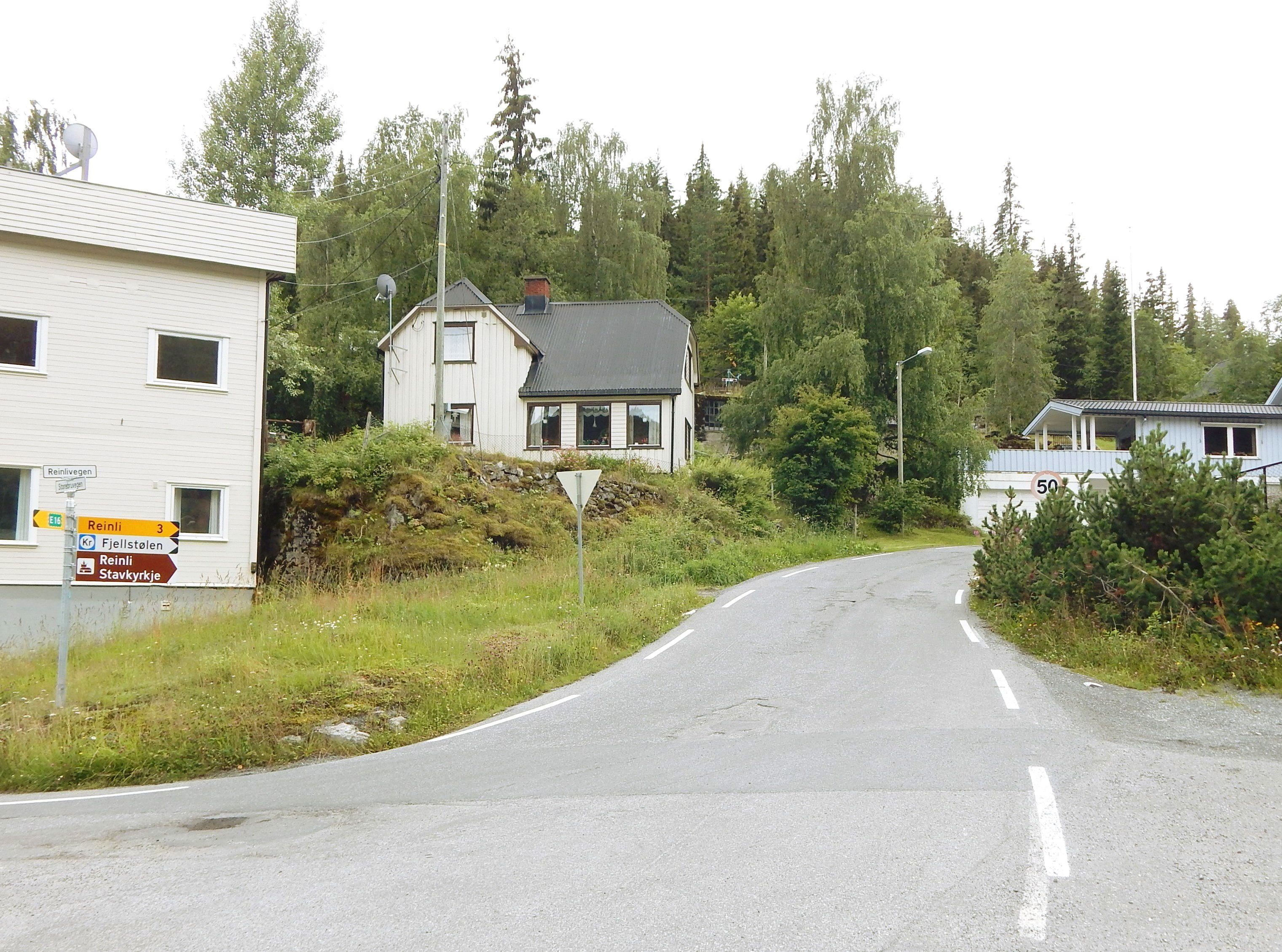 Reinlivegen (FV2446, tidl. FV220) på Bagn